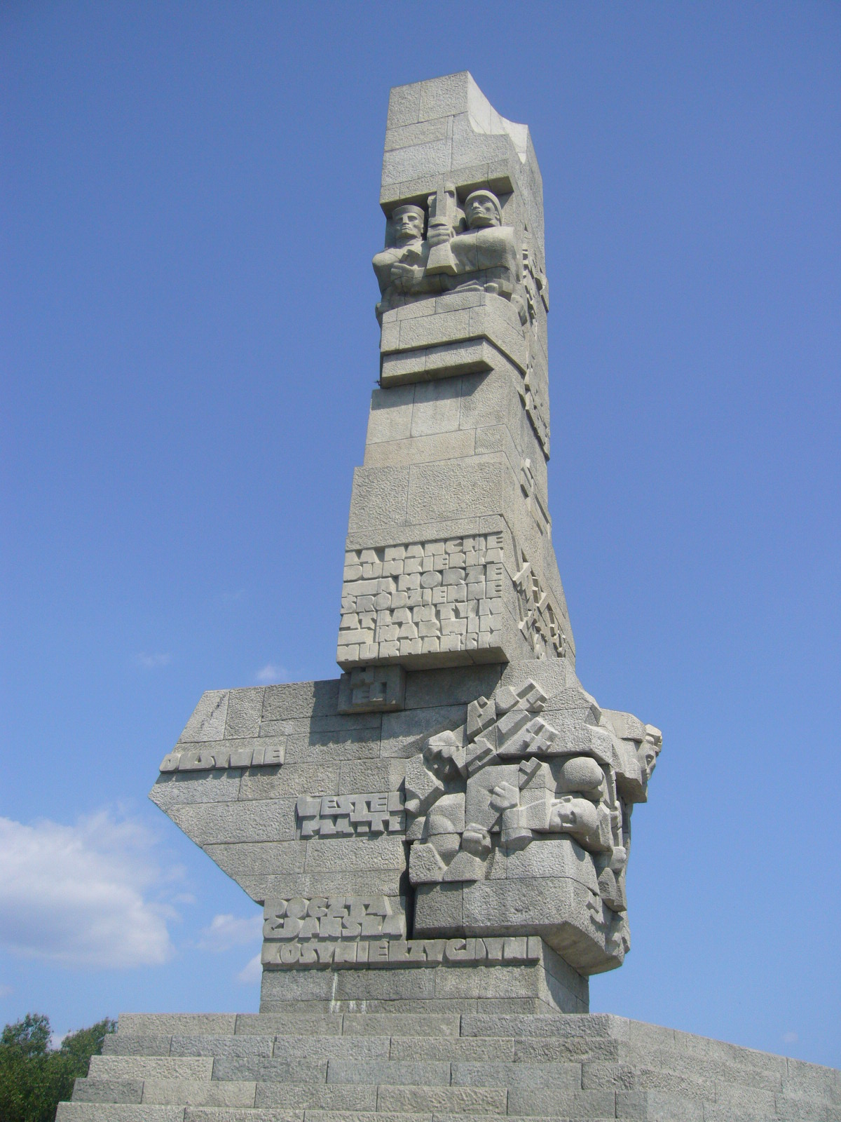 Zdjęcie Pomnika wykonane w 2011 roku